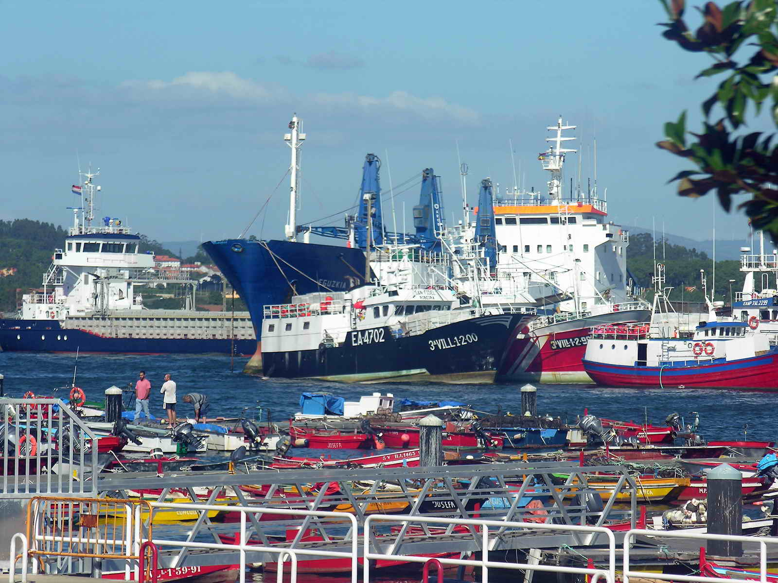 Ribeira - Galicia - Spain